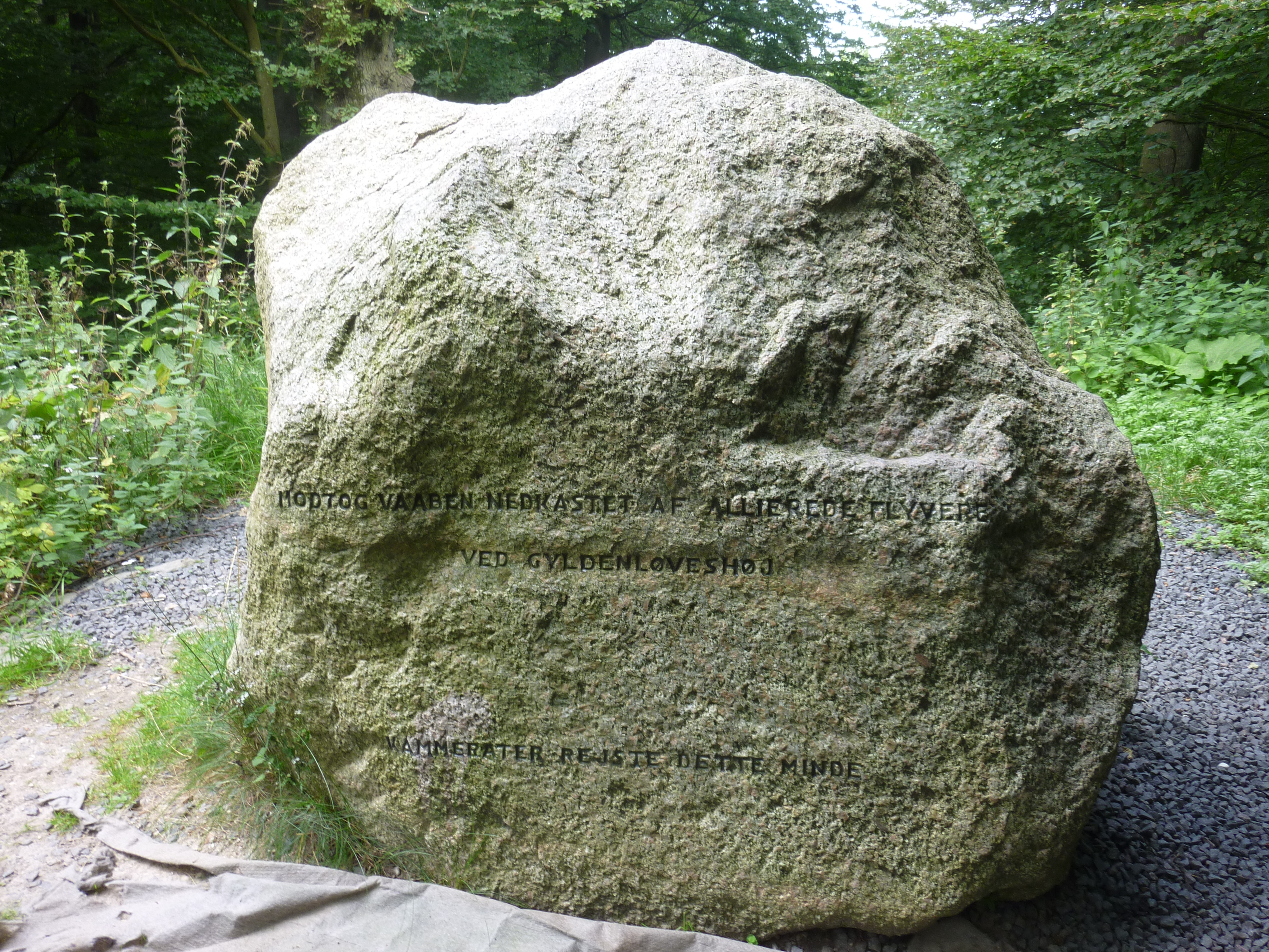 MODTOG VAABEN NEDKASTET AF ALLIEREDE FLYVERE VED GYLDENLØVESHØJ KAMMERATER REJSTE DETTE MINDE